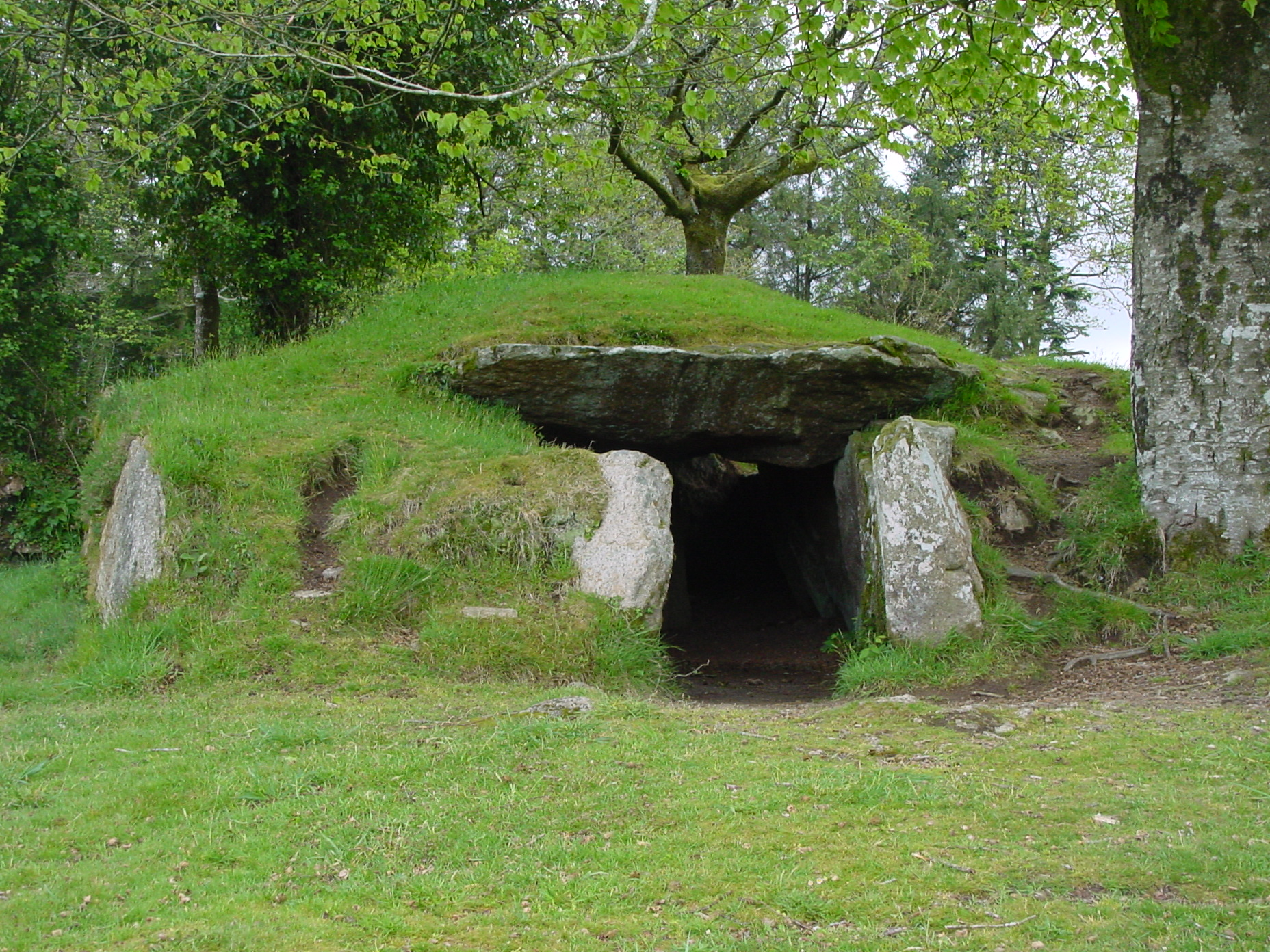 Dolmen en V recouvert d'un tumulus .